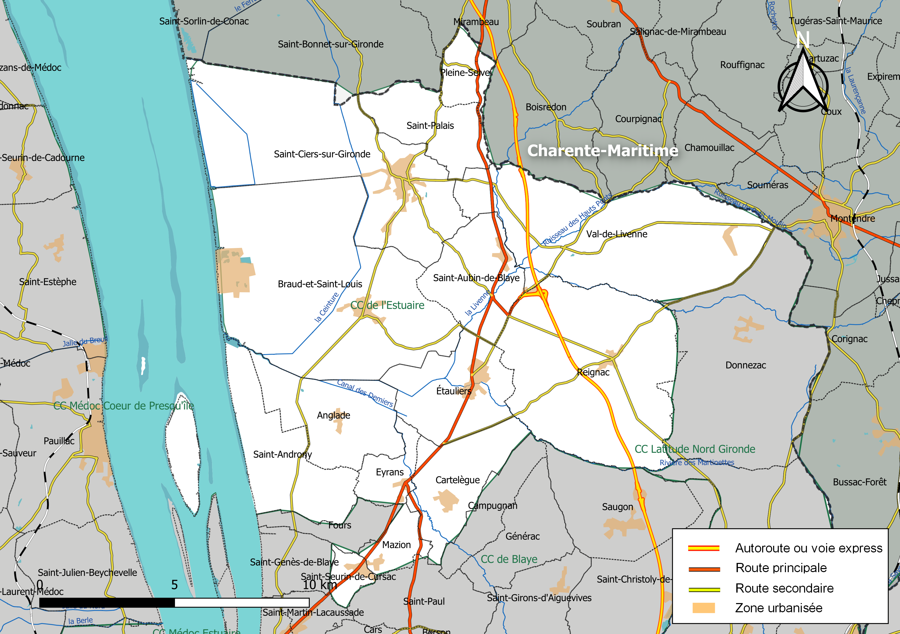 Carte géographique de la Communauté de communes de l'Estuaire, département de la Gironde, France. Composition au 1er janvier 2019.